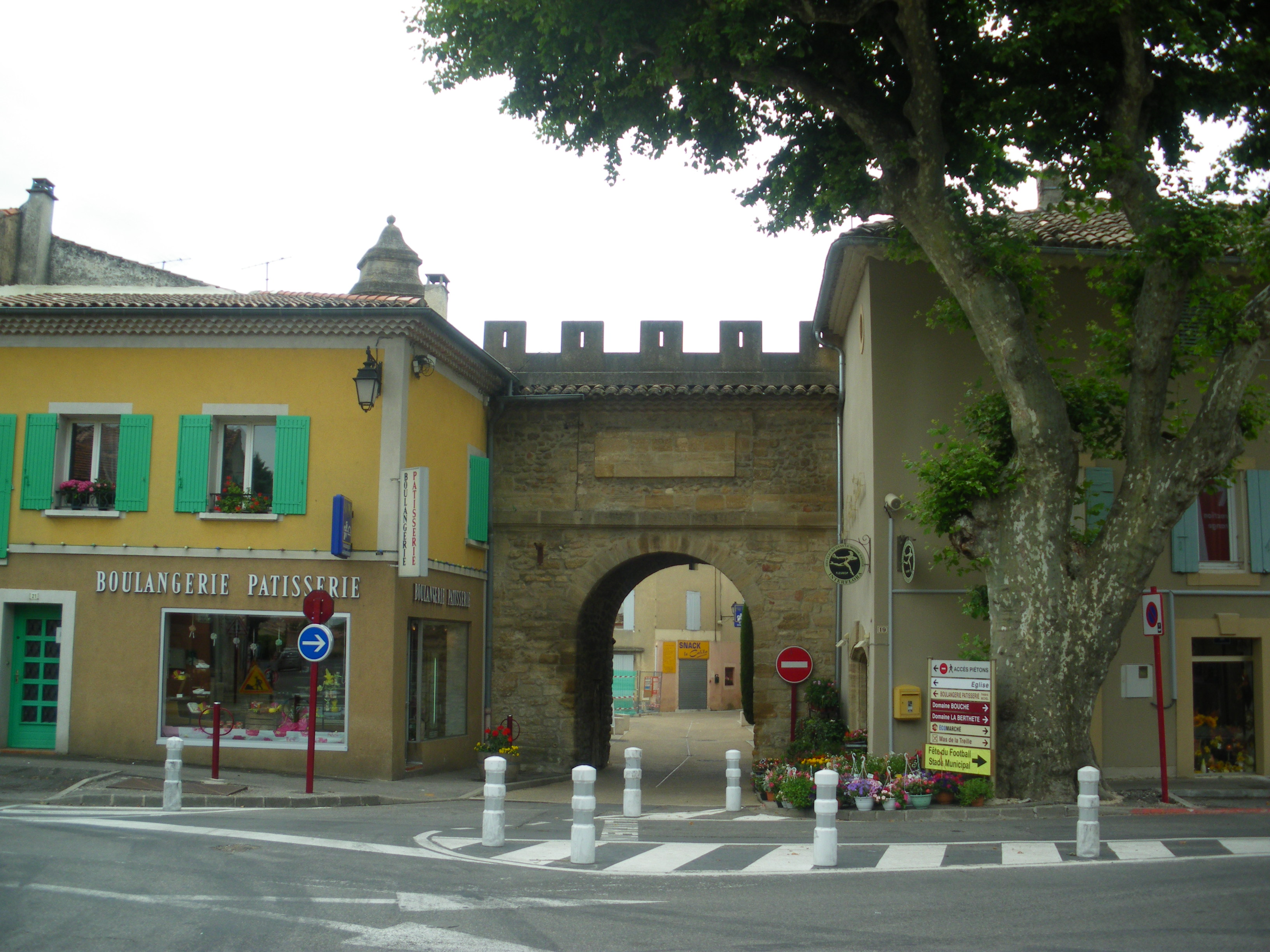 Ancienne porte des remparts de Camaret, Vaucluse